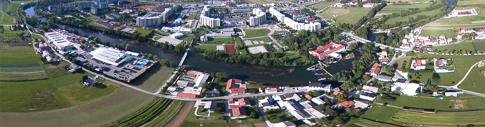 Poševna zračna fotografija nad Fužinami (vzhodno območje Ljubljane)